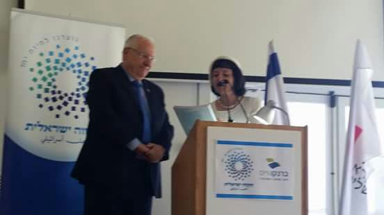 הענקת פרס הוקרה